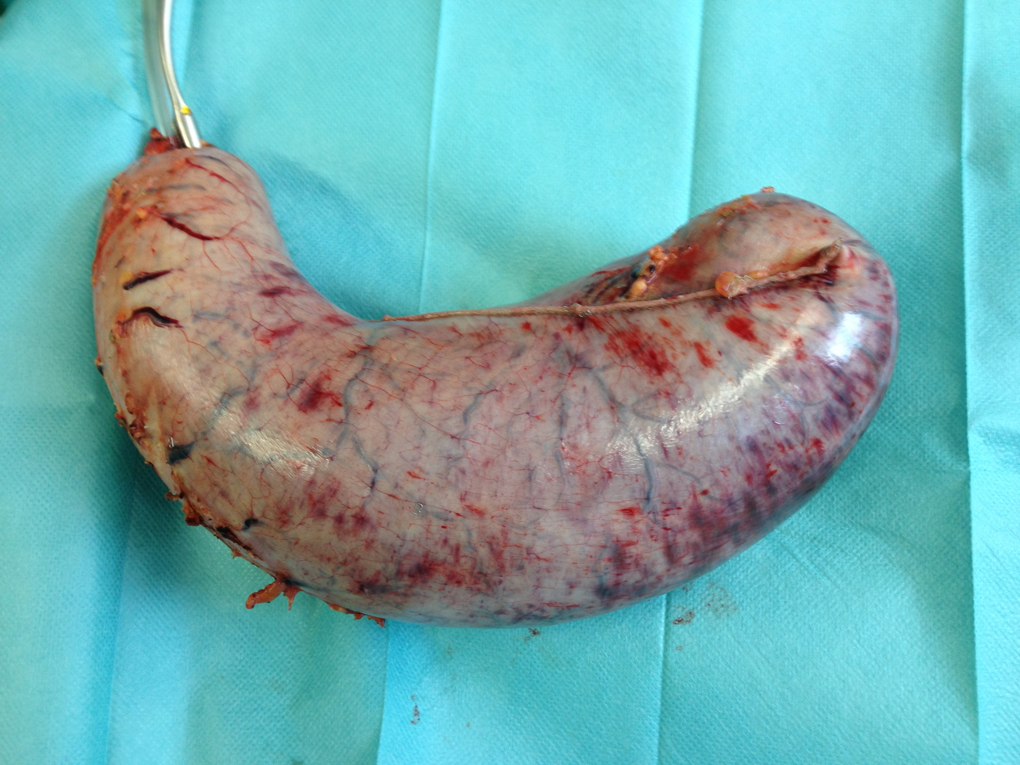 Schlauchmagen. Resektat mit Füllung zur Volumenmessung